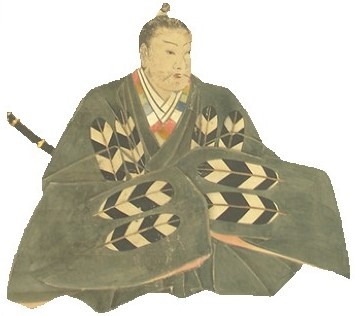 菊池政隆の肖像。